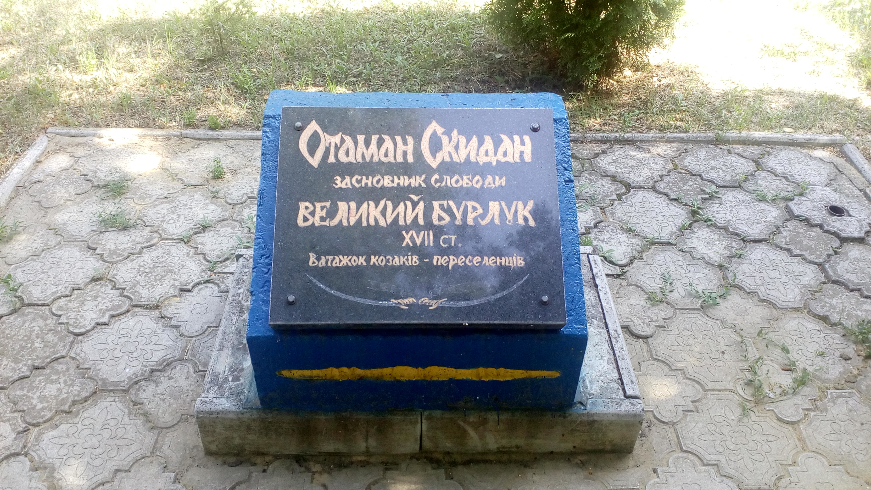 Вікіекспедиція до Великобурлуцької громади. Великий Бурлук, 15 червня 2019 року.Меморіальний знак легендарному осадчому Великого Бурлука — отаману Скидану